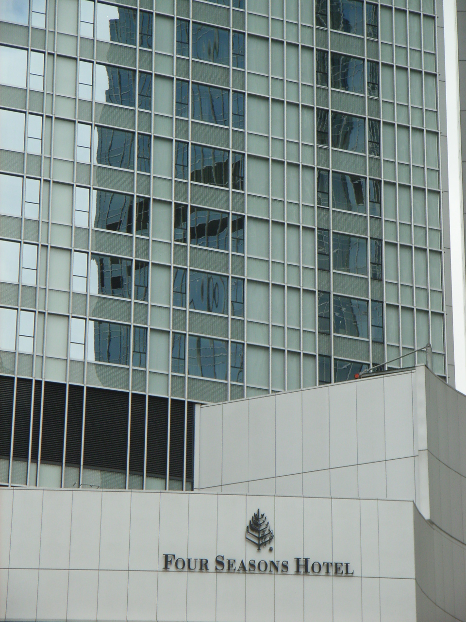 香港四季酒店位於中環海旁，是國際金融中心的一部份。酒店於2005年9月開幕。 by TangHon